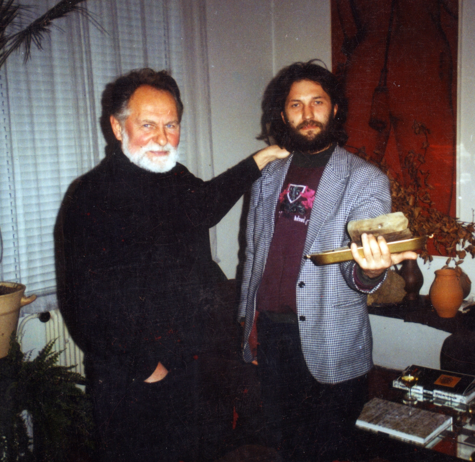 Алекс Млынарчик и Владимир Вельтман. Братислава, 1999. Фото получено путём автоспуска фотоаппарата, установленного на штативе.